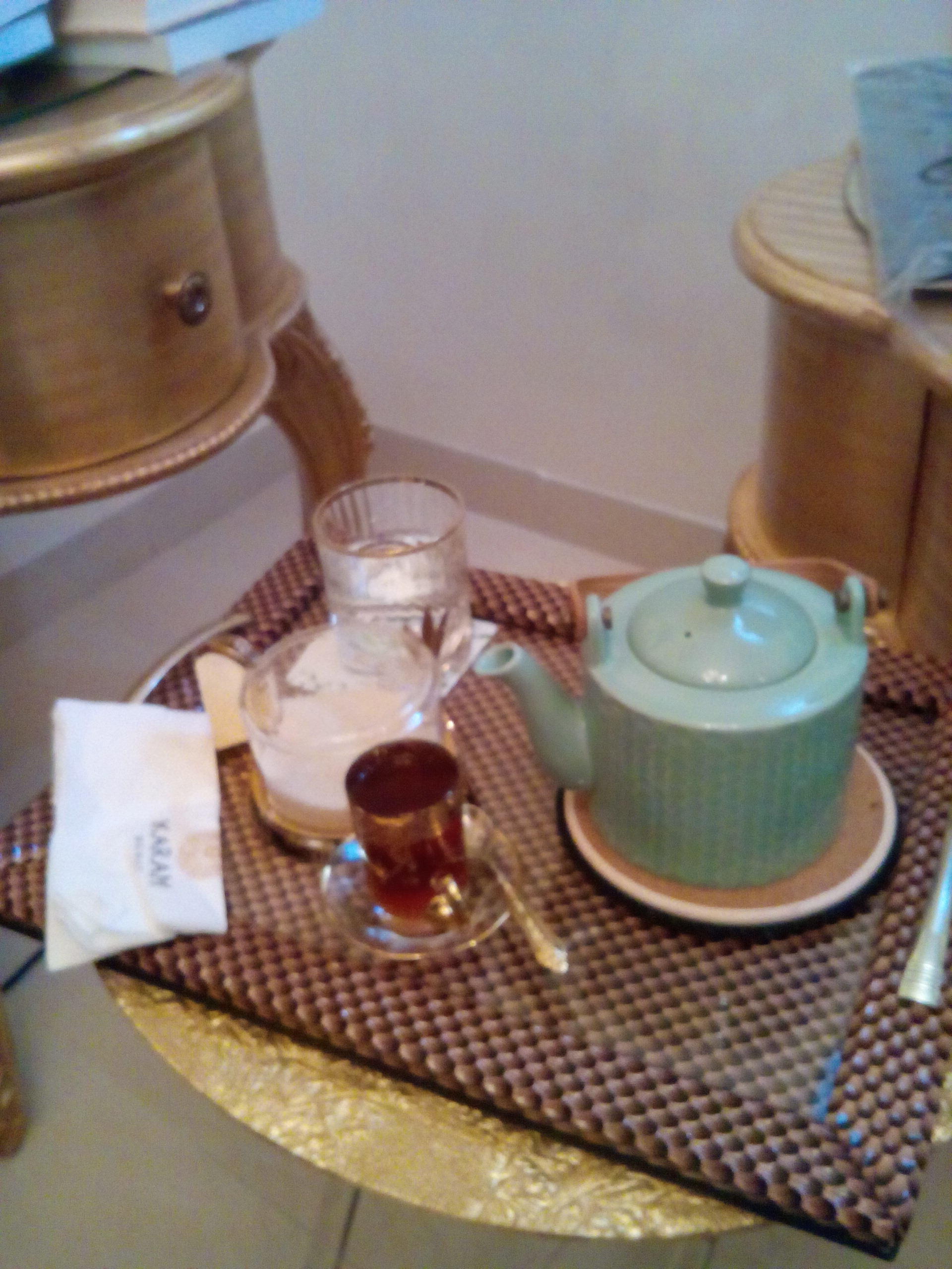 مائدة عليها ابريق شاي مع سكر وقدح مذهب لشرب الشاي